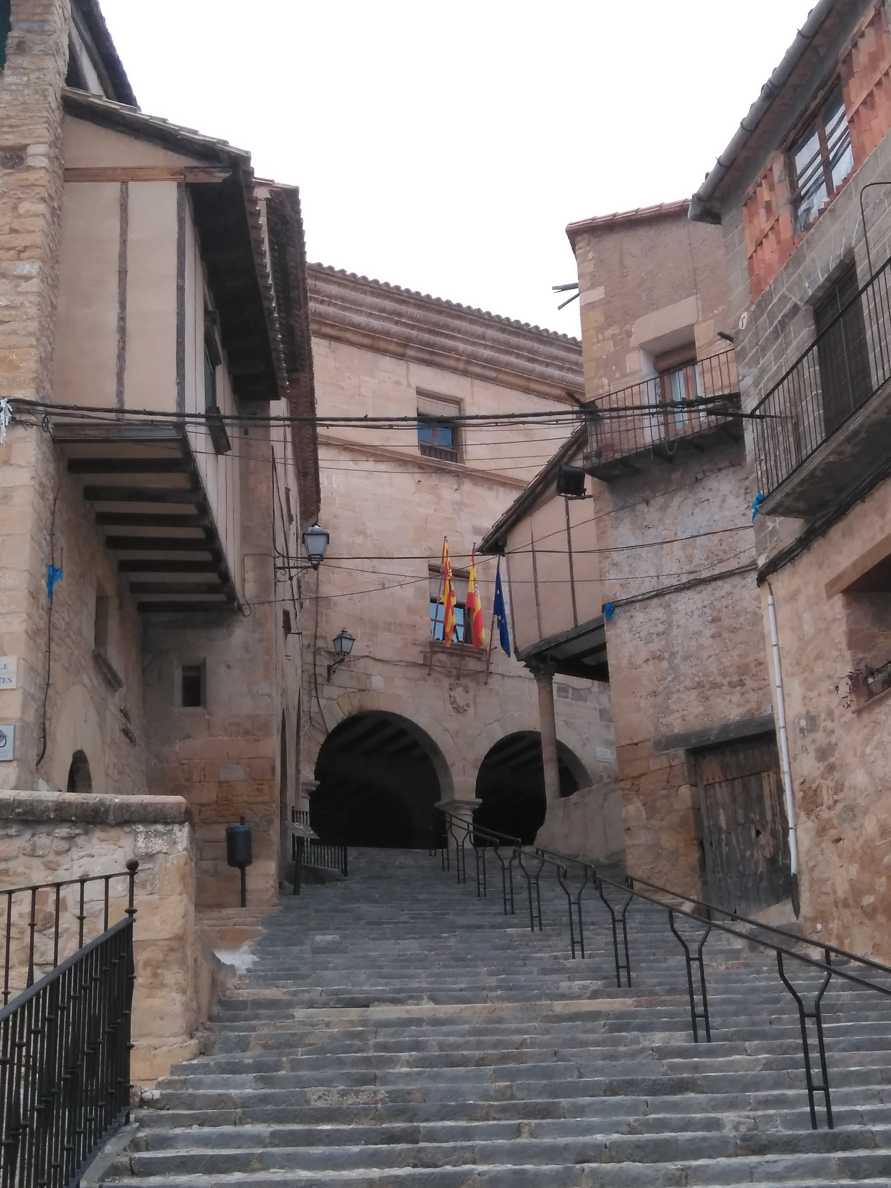 Casa de la vila de Mont-roig de Tastavins